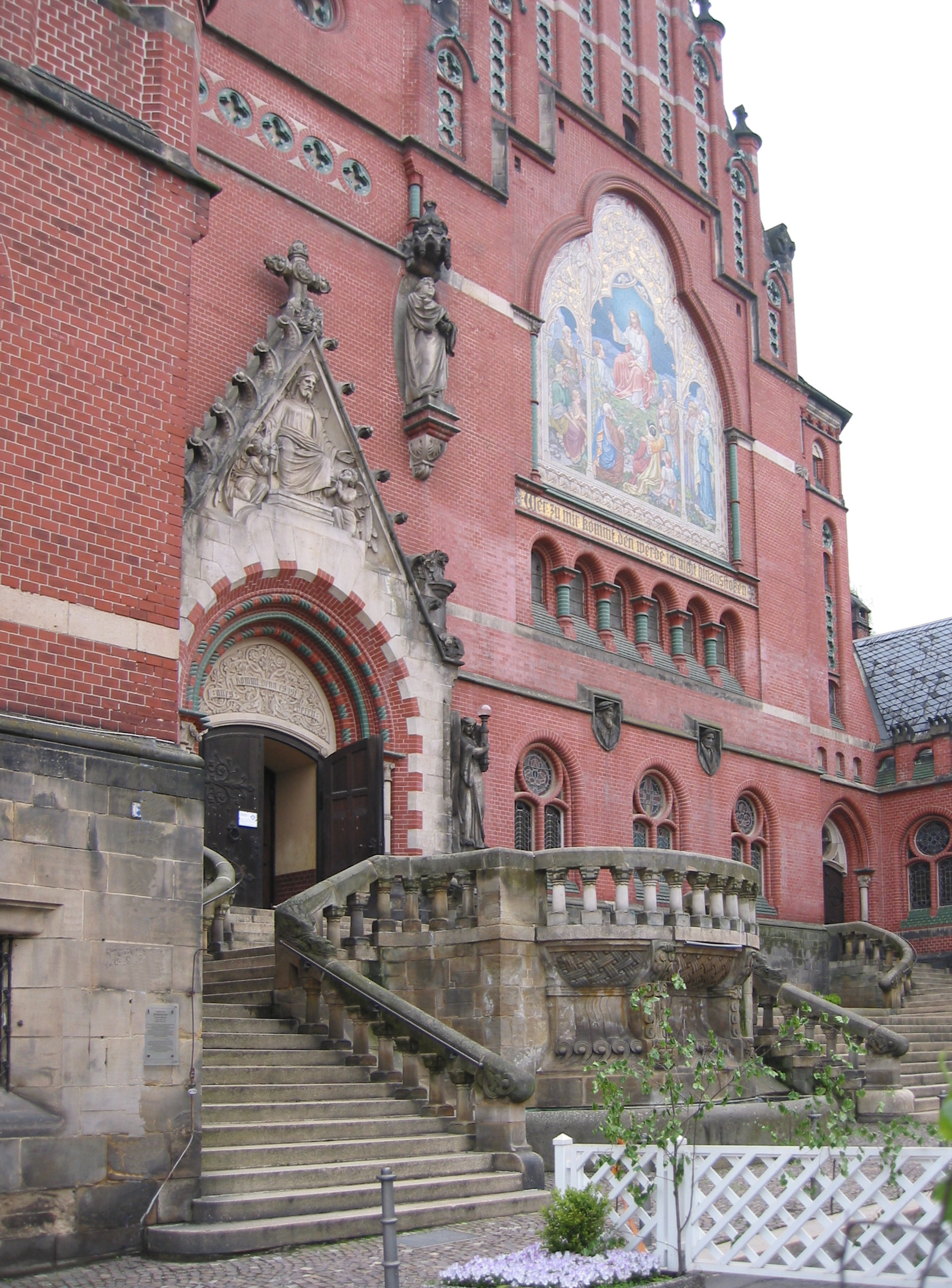 Altenburg Brüderkirche Ost-Portal